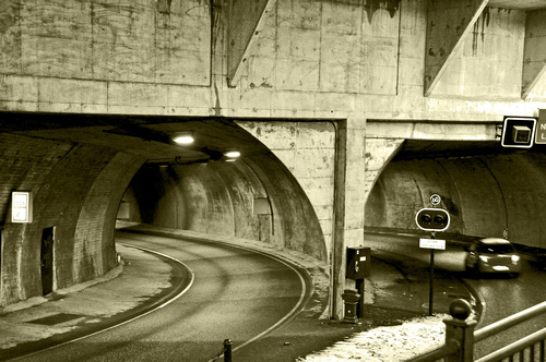 Nygaards tunnel